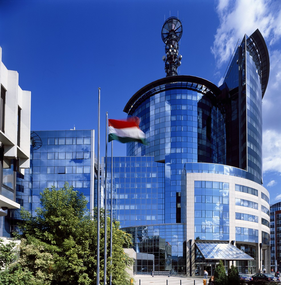 Budapest, XIII. ker., Teve utca 4-6. ORFK-BRFK központ